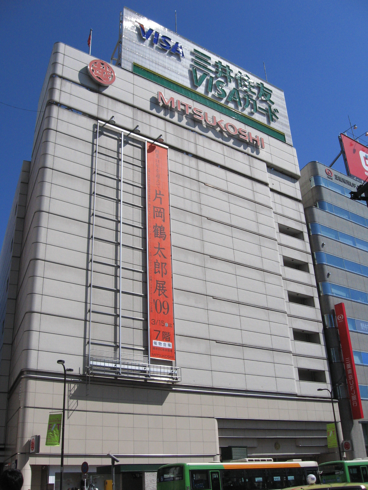 Mitsukoshi Ikebukuro.